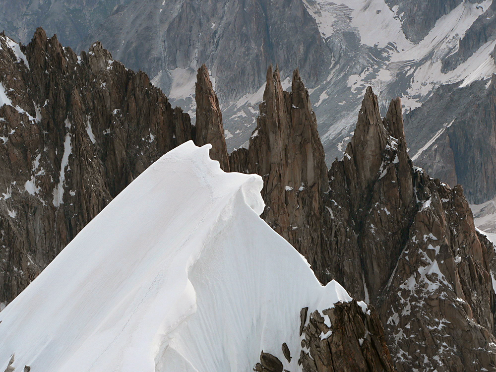 Les aiguilles du Diable, vues depuis l'arête Küffner du Mont Maudit